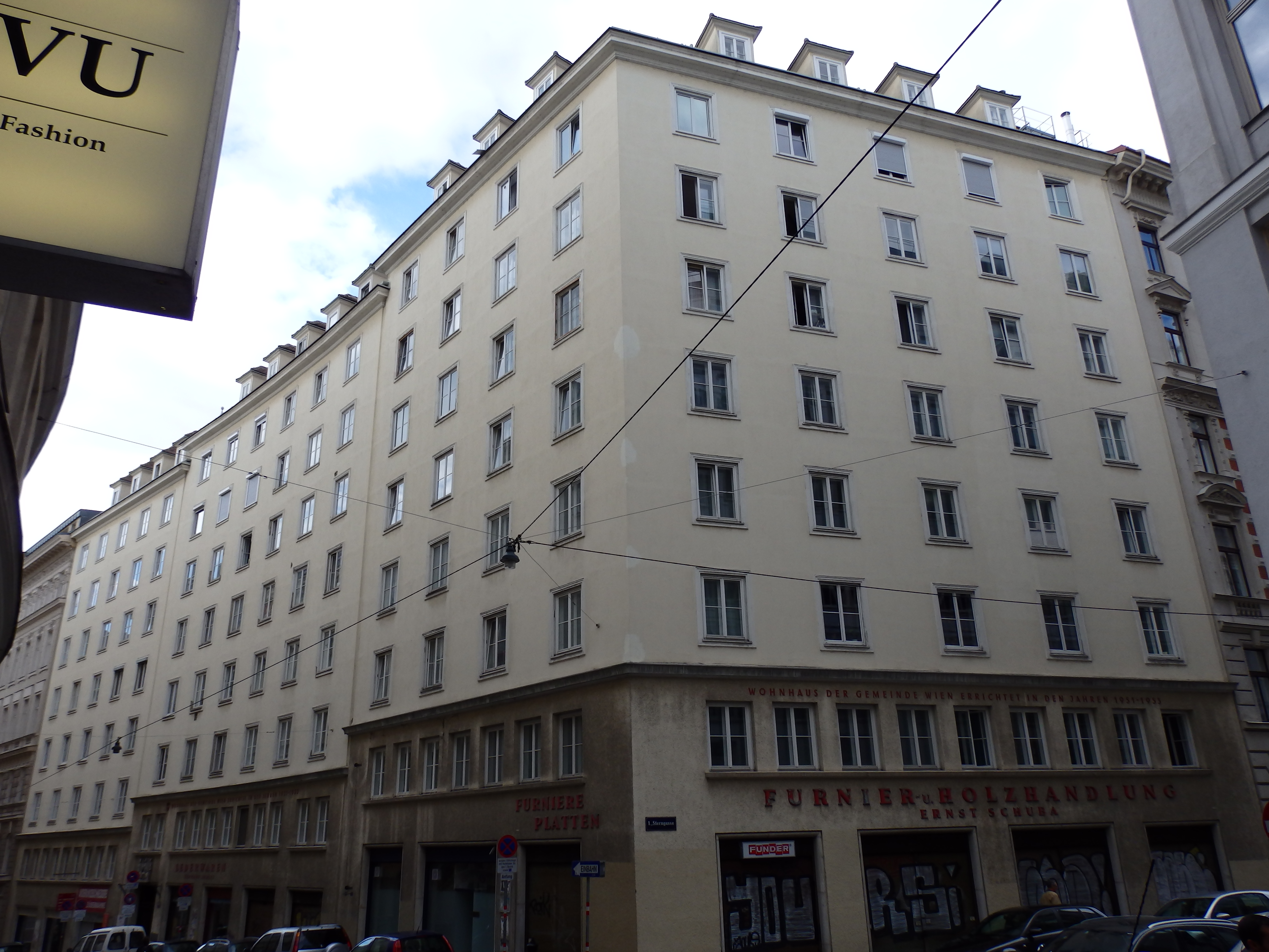 Gemeindebau (1951-1953) von Otto Niedermoser und Hans Petermair, Fischerstiege 4-8, Wien-Innere Stadt